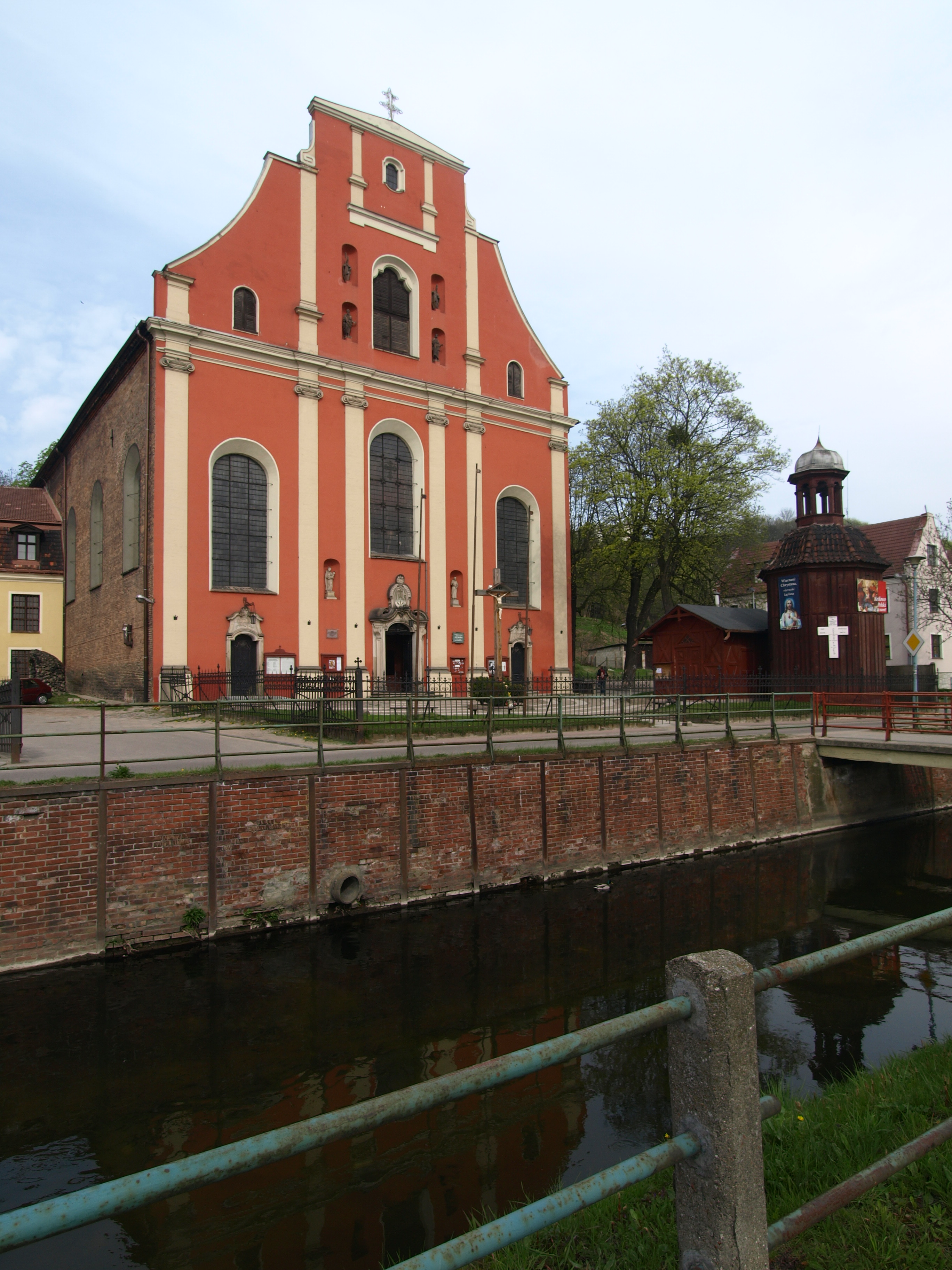 Gdańsk Stare Szkoty. Kościół św. Ignacego Loyoli i kanał Raduni.